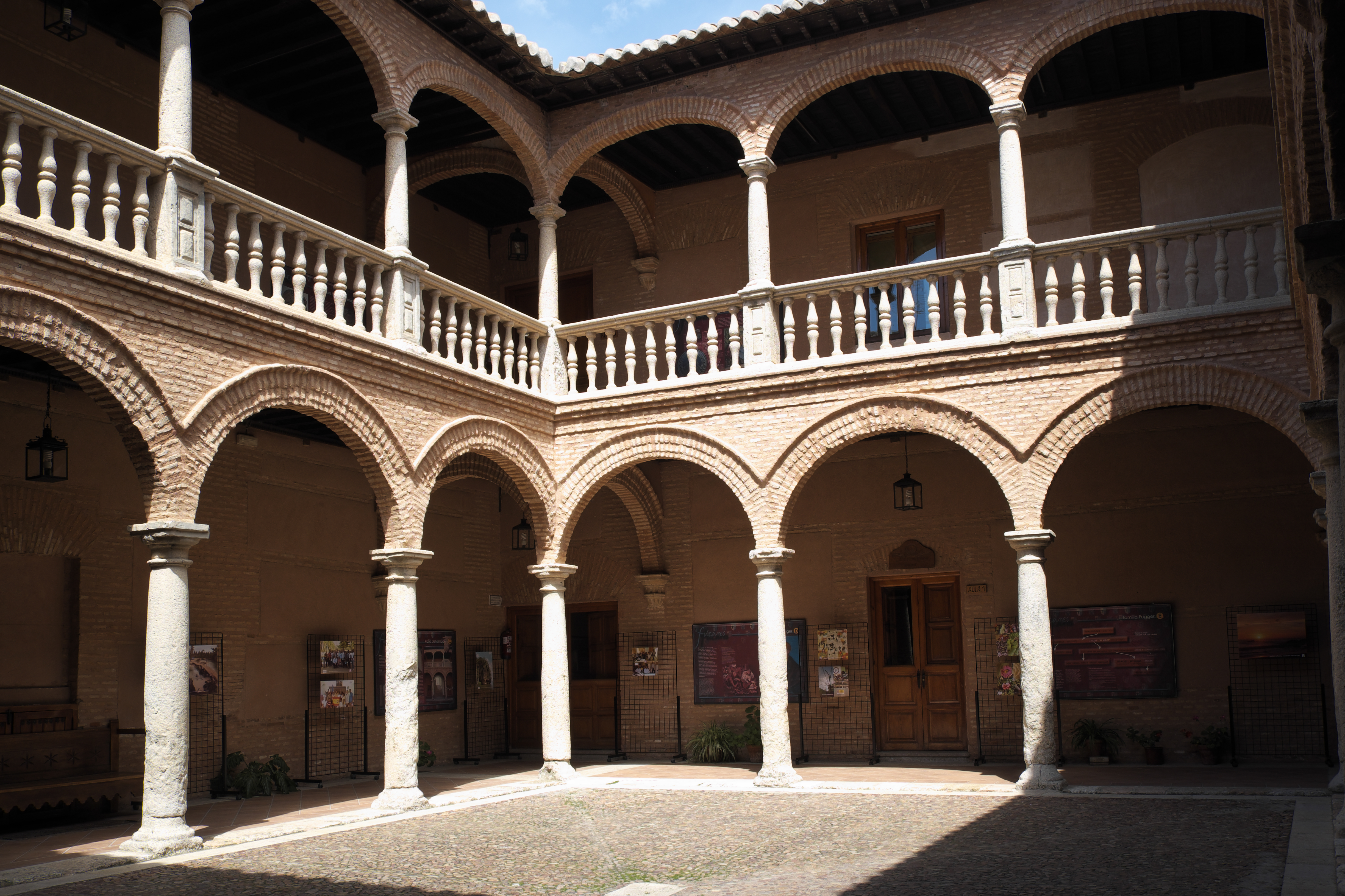 Faktorei der Fugger, Almacén de los Fúcares, in Almagro in der Provinz Ciudad Real (Kastilien-La Mancha/Spanien), Innenhof